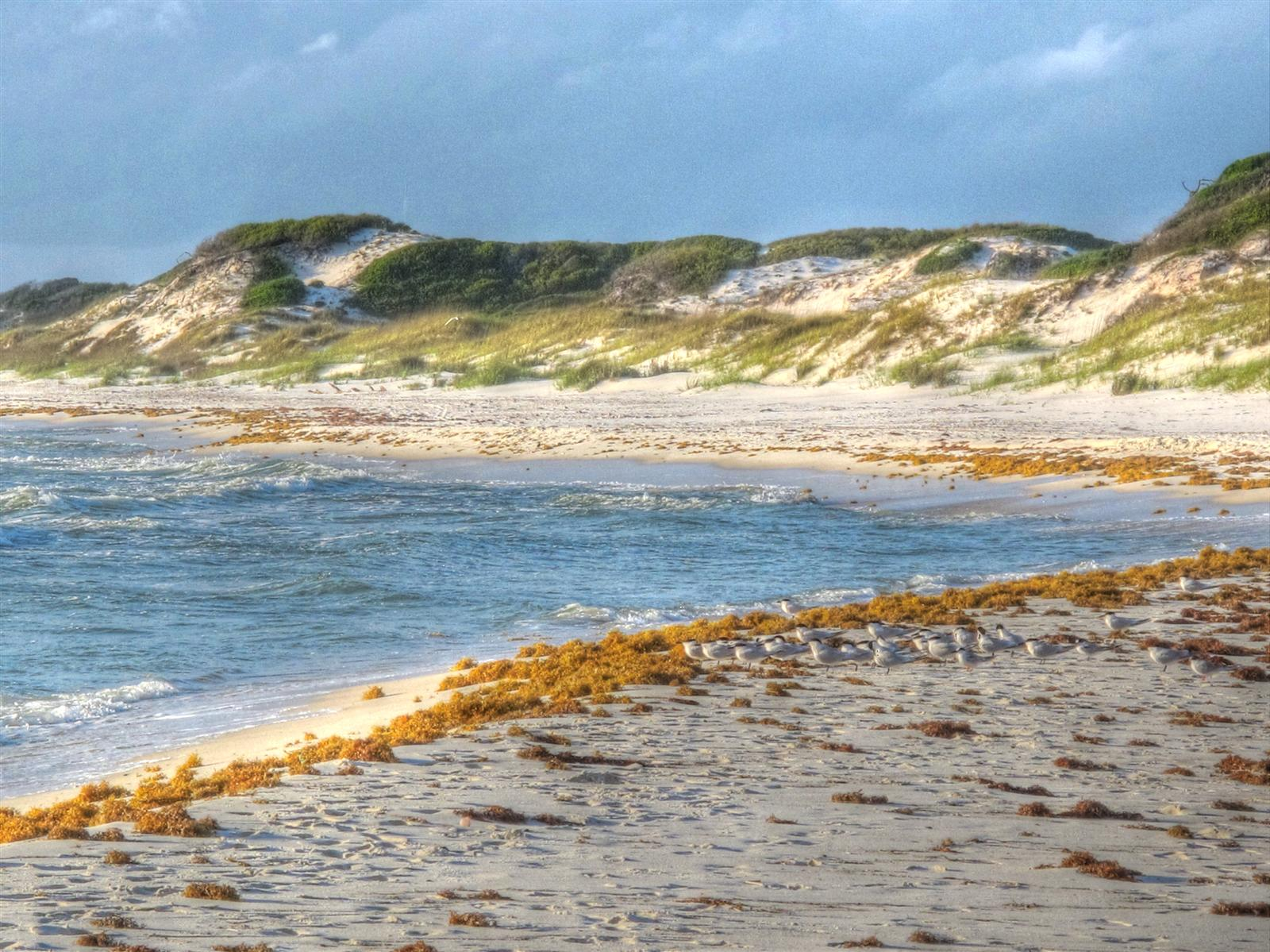 Dunes - St Joseph Pennsula